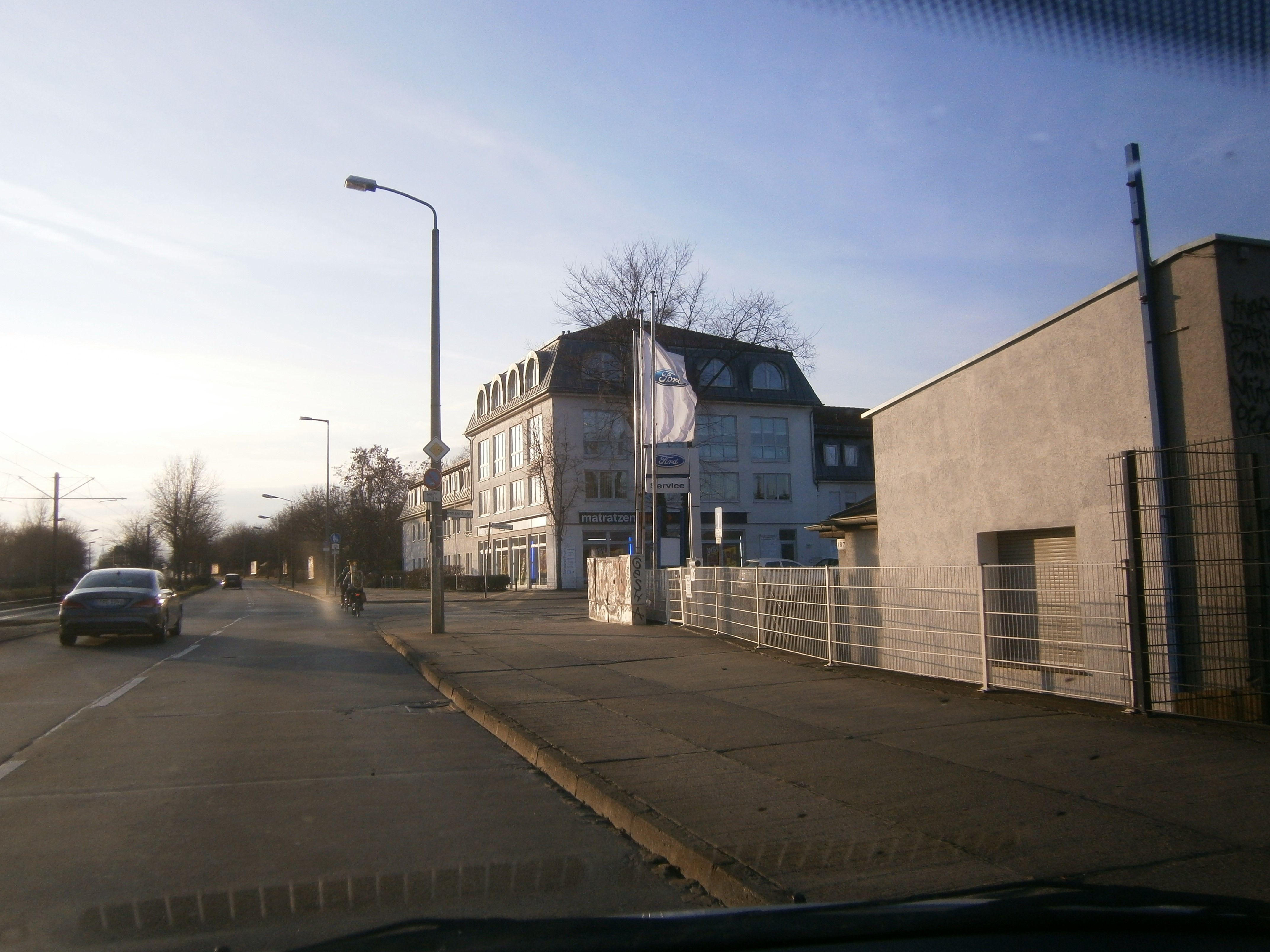 Die Hansastraße ist eine Berliner Straße mit übergeordneter Bedeutung in den Ortsteilen Alt-Hohenschönhausen und Weißensee. Sie liegt zwischen der Indira-Gandhi-Straße und der Großsiedlung Hohenschönhausen-Nord. Der Blick von der Nordostseite der Straße in Richtung Mündung der Liebermannstraße.